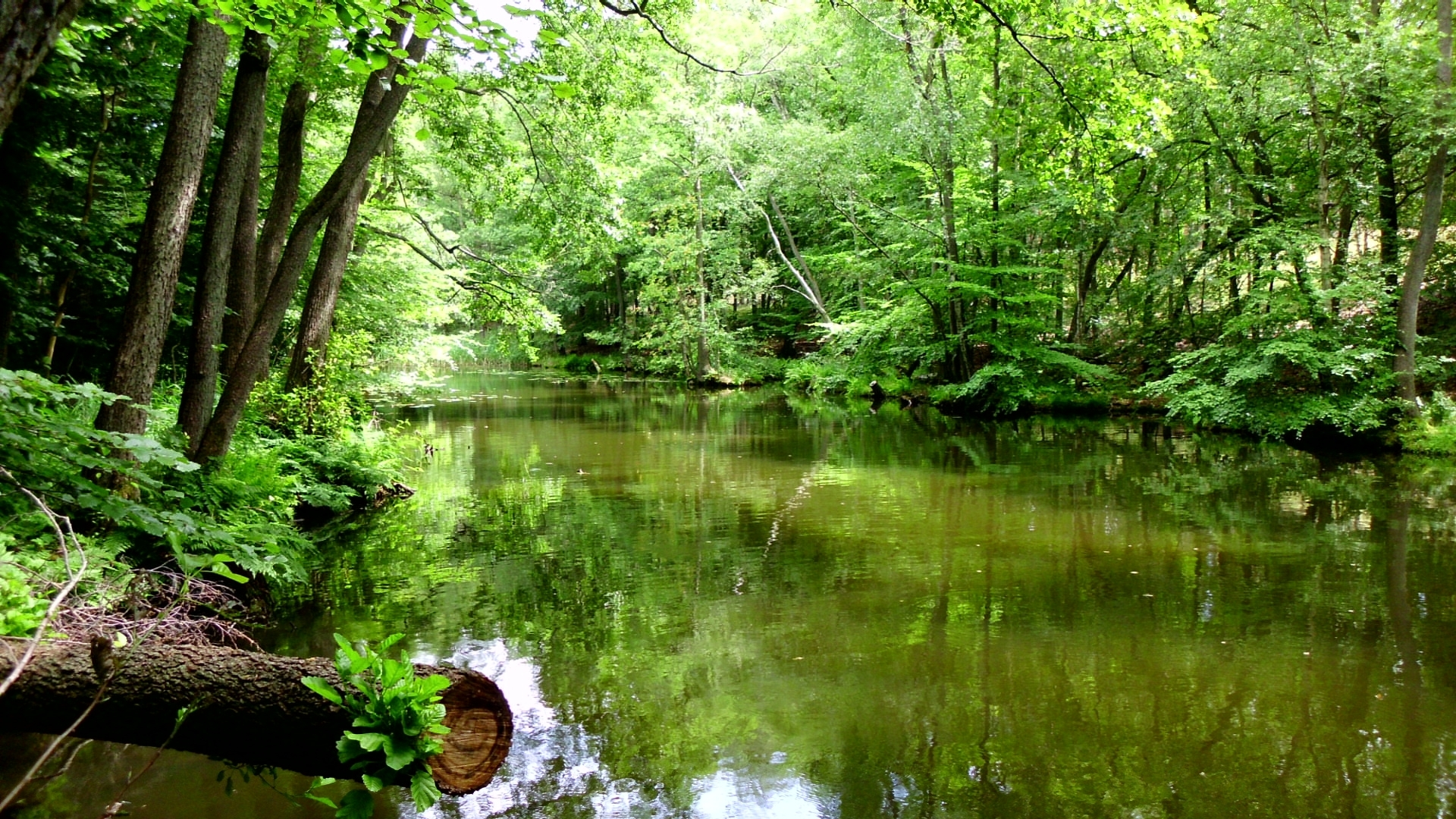 Die Havel zwischen Görtowsee und Zierzsee in der Neustrelitzer Kleinseenplatte. Sie gehört hier zum Müritz-Nationalpark und trägt in diesem ca. 750 m langen Abschnitt den Namen „Moosbeck“ (Gemeinde Roggentin, Landkreis Mecklenburg-Strelitz, Mecklenburg-Vorpommern).